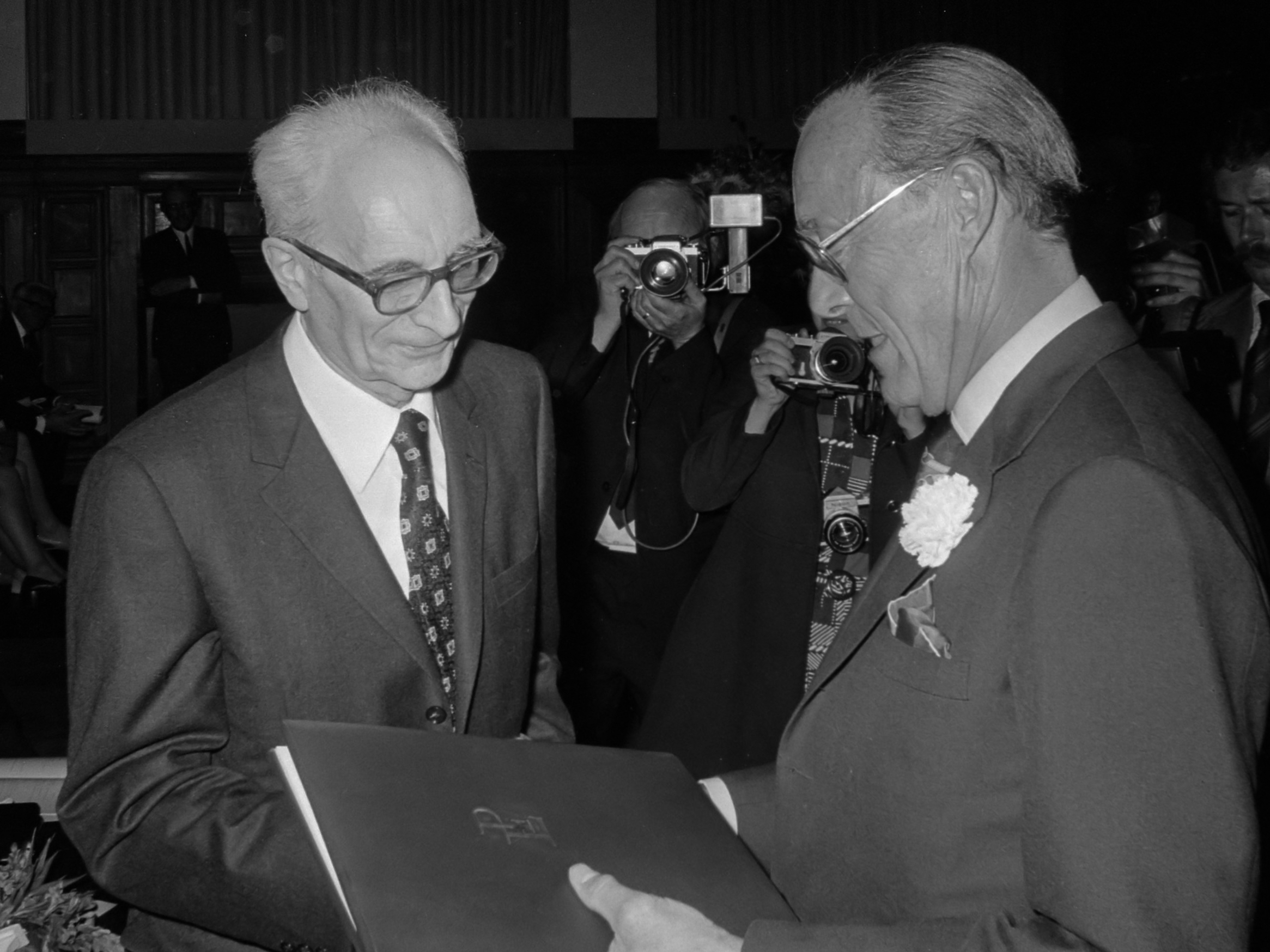 Prins Bernhard reikt Erasmusprijs uit aan prof. Claude Levi Strauss in Tropenmuseum in Amsterdam 28 mei 1973